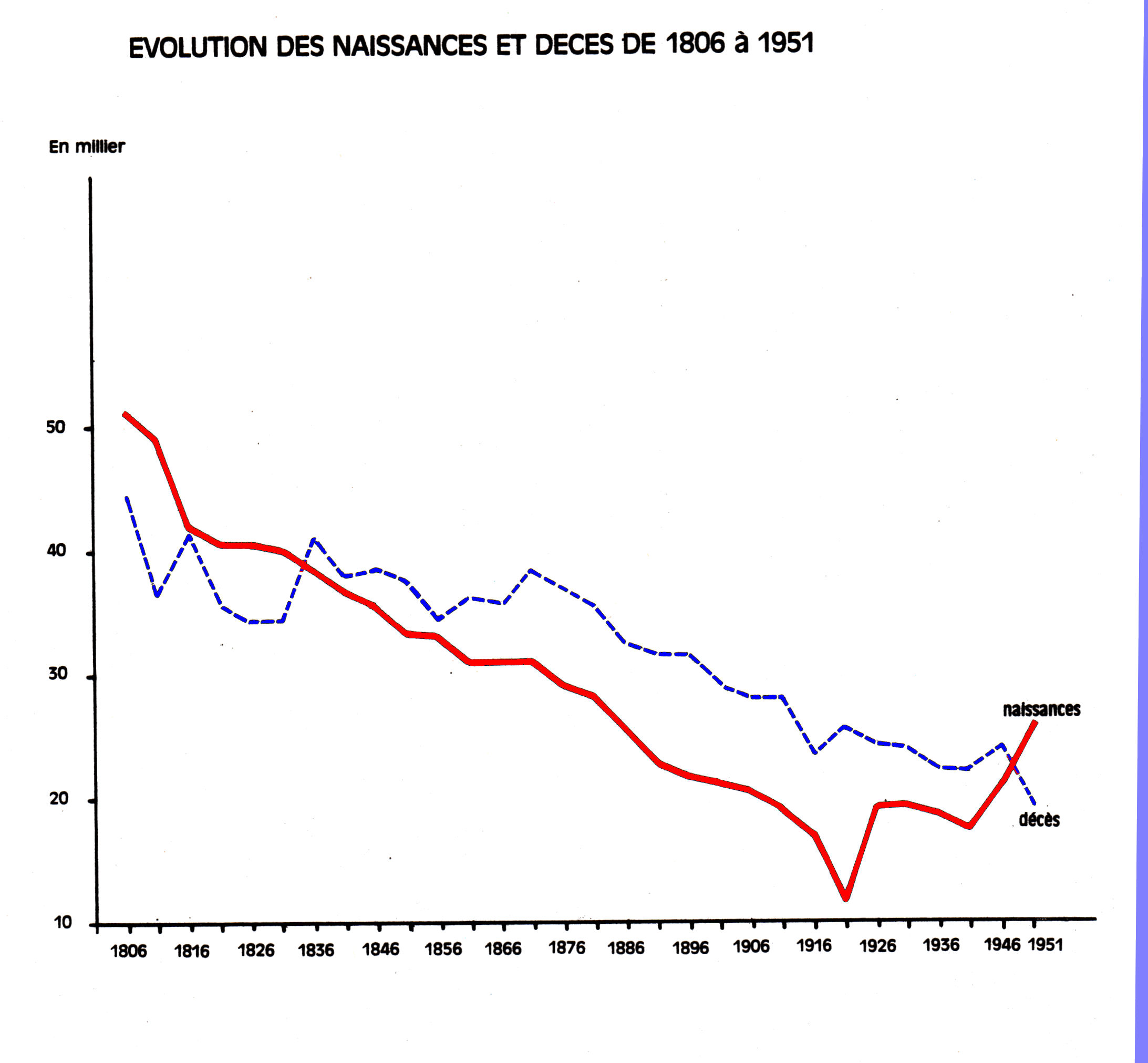 Courbes de l'évolution des naissances et des décès de 1800 à 1951